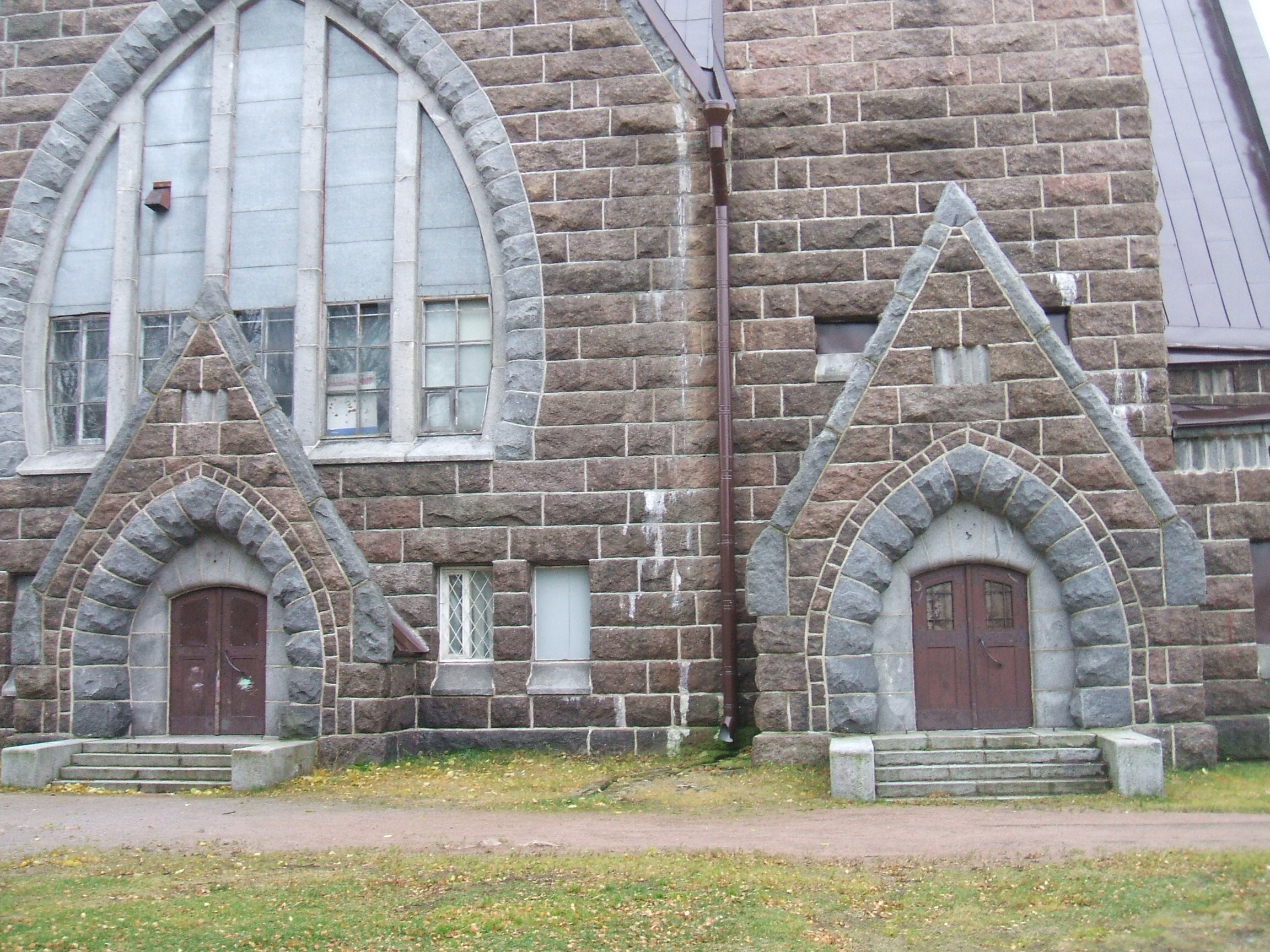 фасадф кирхи Приморска